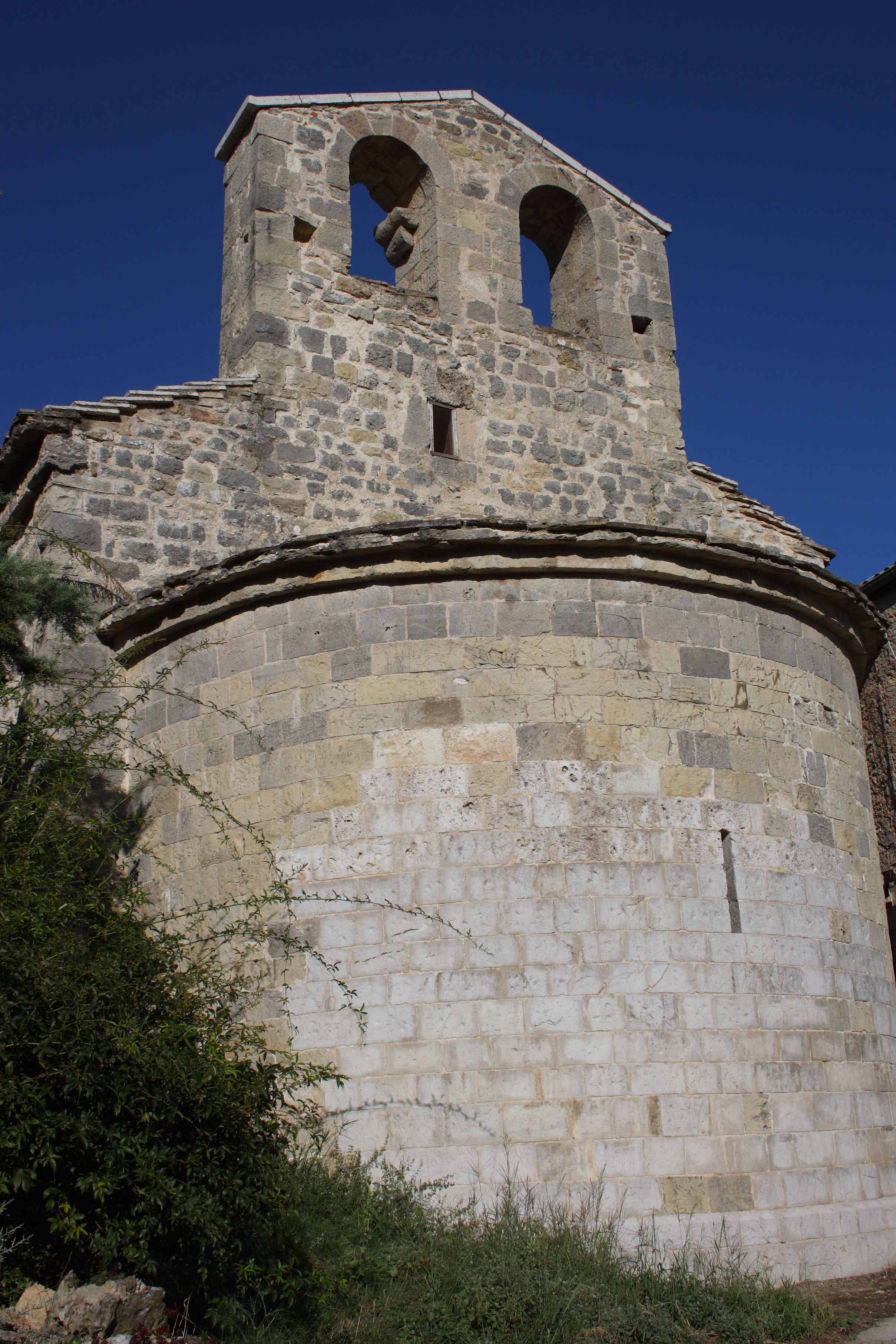 Chapelle Notre-Dame de Bethléem, ehemalige Kapelle einer Templerkommende in Bras (Var), einer Gemeinde im Département Var in der französischen Region Provence-Alpes-Côte d'Azur, aus dem 13. Jh., romanische Apsis, Glockengiebel